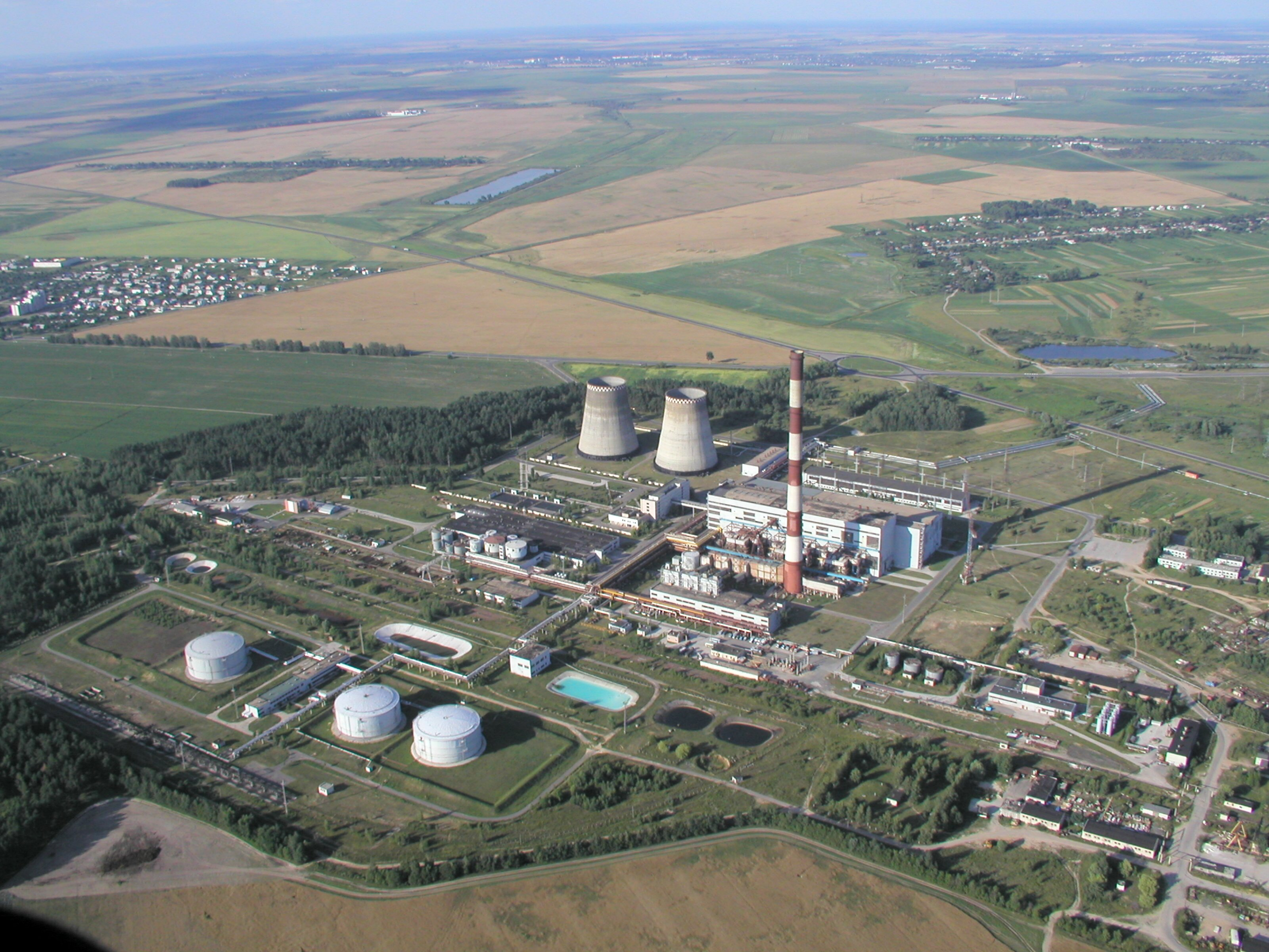 Электростанция, основной работодатель для жителей Урицкого